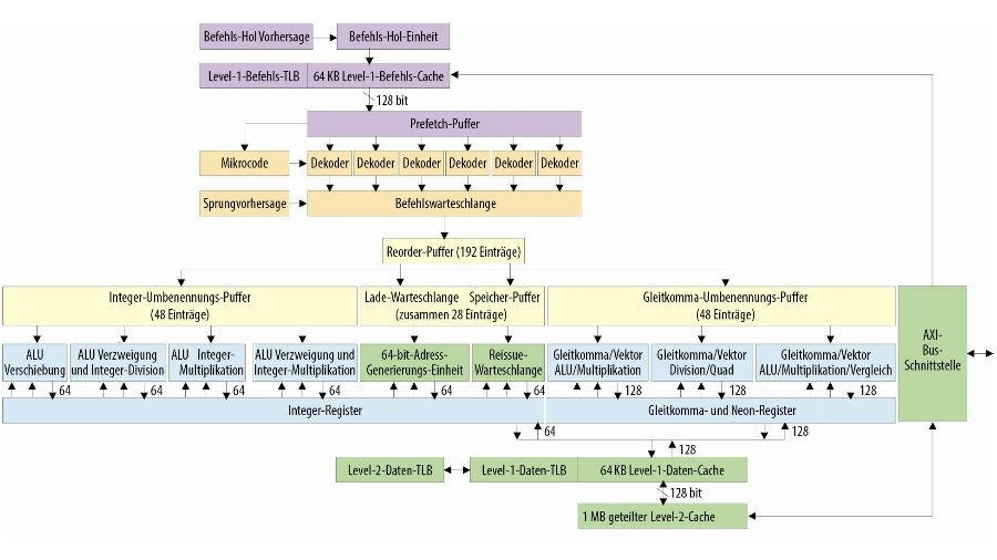 Blockschaltbild von Apples 64-bit-Cyclone-CPU der zweiten Generation. Es handelt sich um die komplexeste Mikroarchitekur aller ARM-Mobilprozessoren.